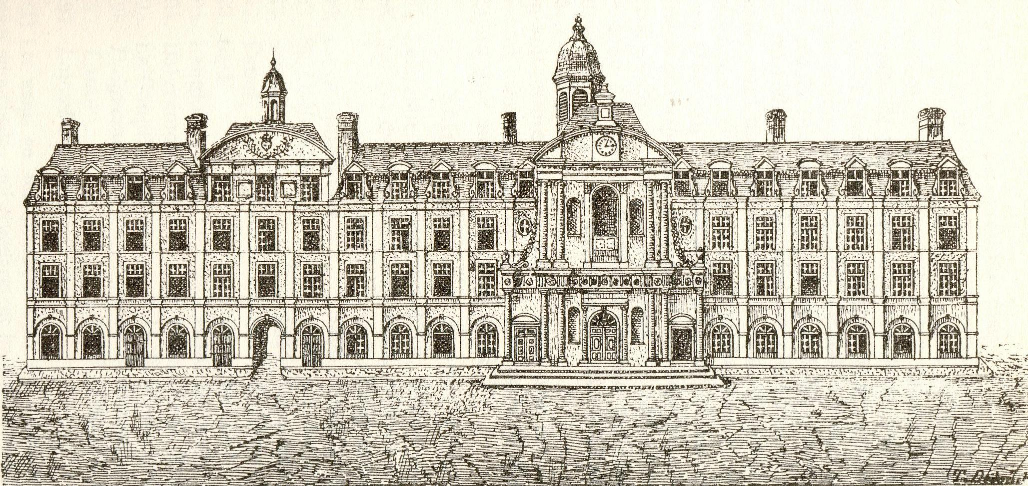 Gravure de l'ancien séminaire des Eudistes de Caen au XIXe